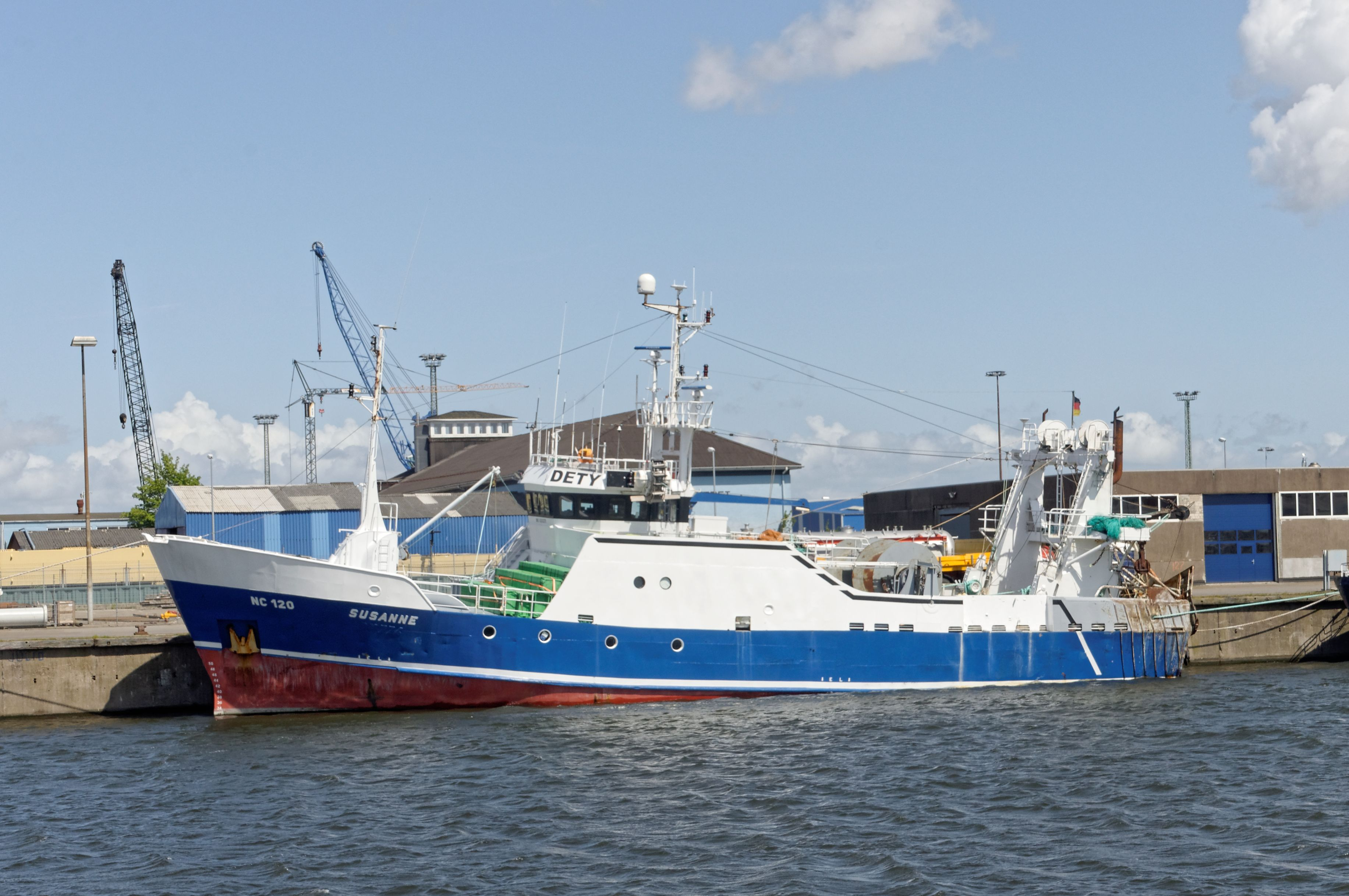 Bilder auch Cuxhaven und den Schiffen dort 2015